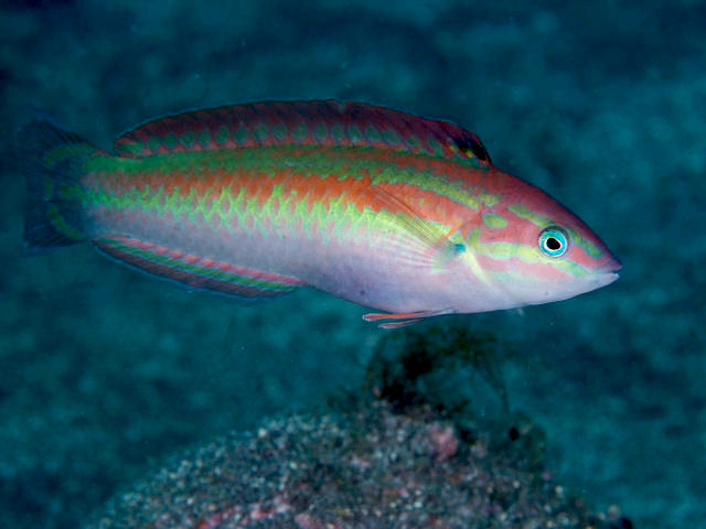 ホンベラ Halichoeres tenuispinis